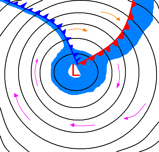 Tämä kaaviokuva on eteläisen pallonpuoliskon syklonista. Lämmin rintama=punainen viiva, Kylmä rintama=sininen viiva, Sadealue=laventelinsininen alue, Tuulet=violetit nuolet, lämpimässä sektorissa oranssit nuolet. Olen piirtänyt kuvan käyttäen apunani lukion maantiedon kirjan kuvaa.